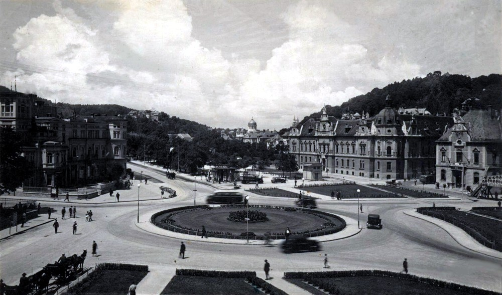 Brasovul interbelic